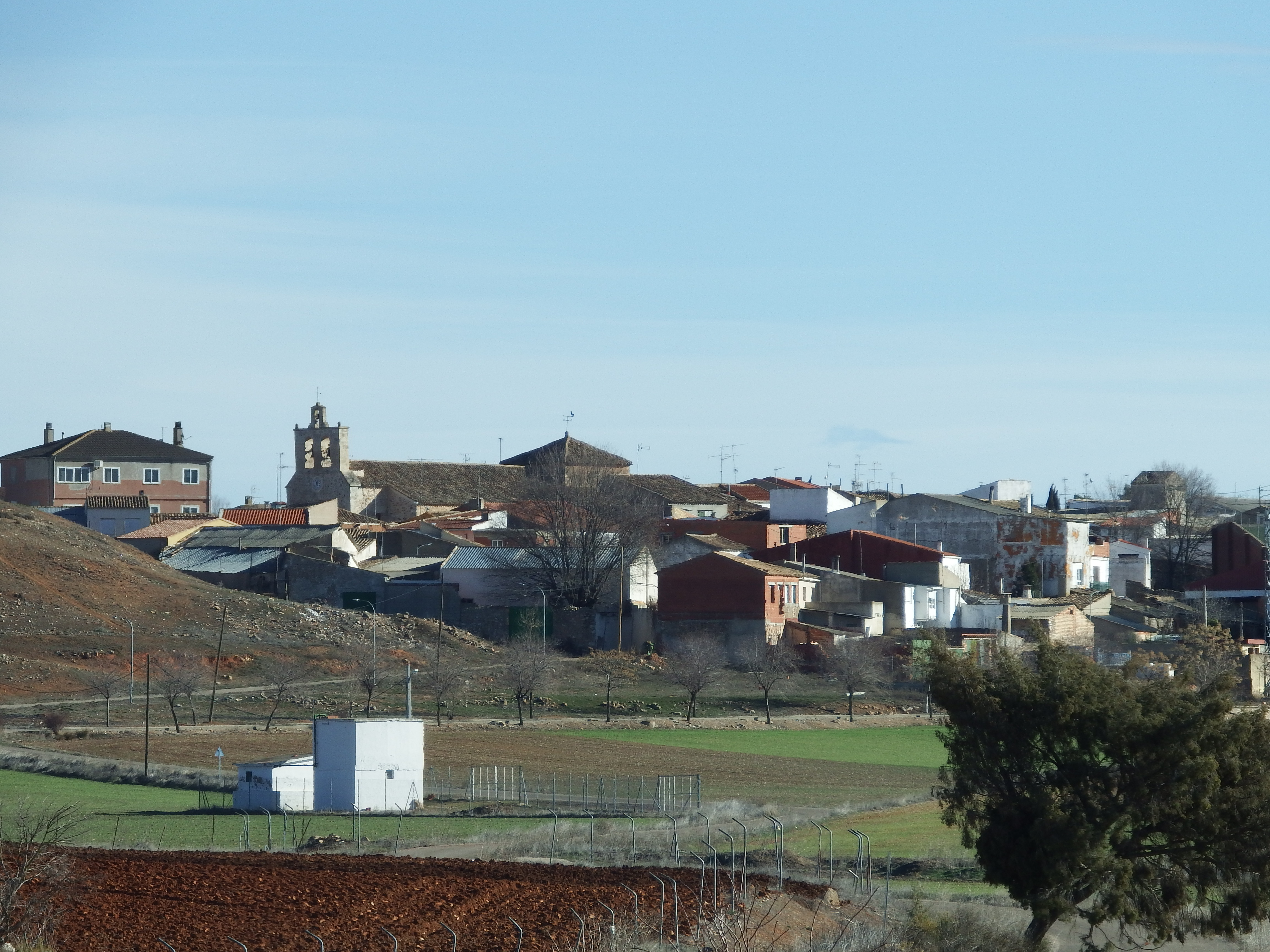 Vista general de Gabaldón